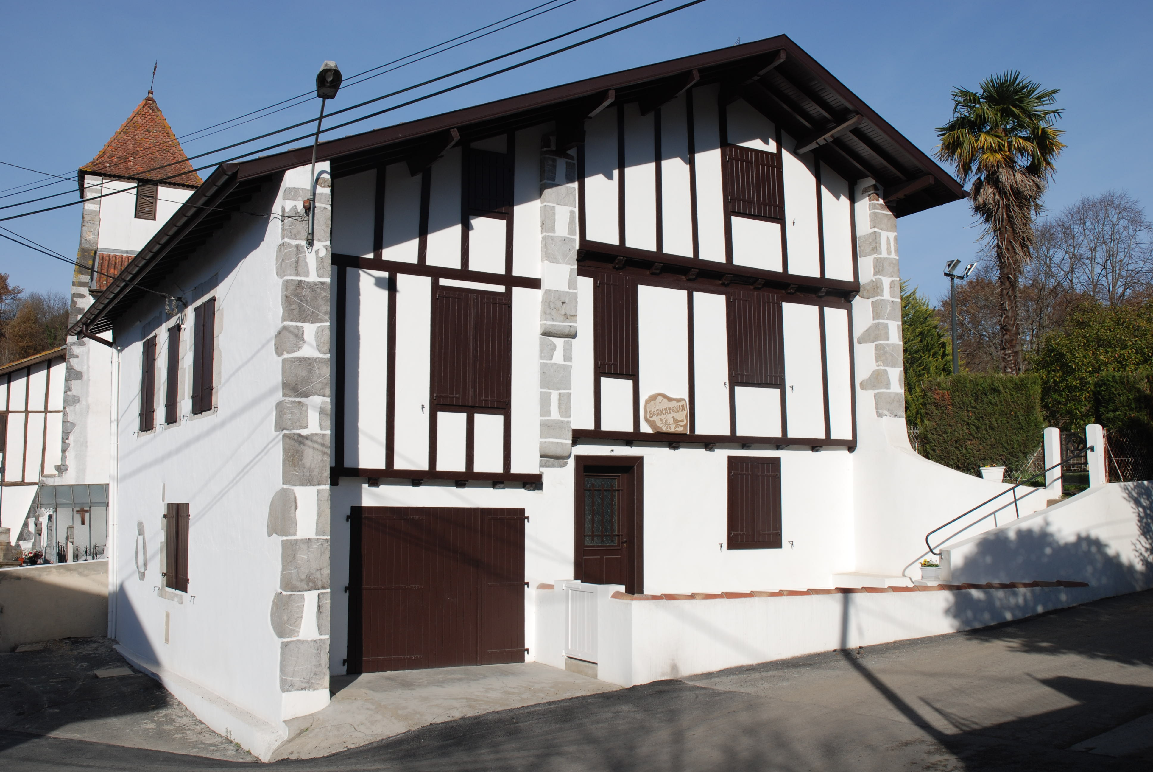 Hasparren, dans le quartier d'Urcuray, la maison Bernatenia. Photo prise le 31/12/06 par Harrieta171